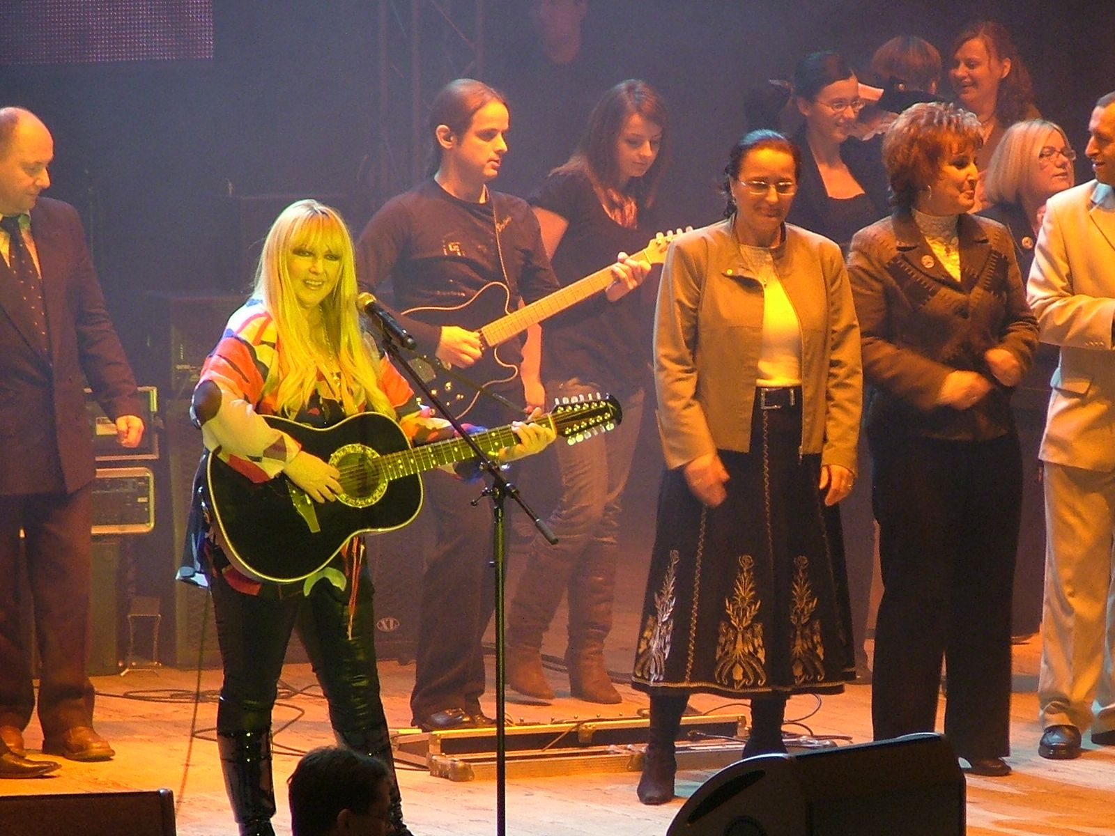 Centralne Obchody Święta Kolejarza 2007, Warszawa, Sala Kongresowa Maryla Rodowicz